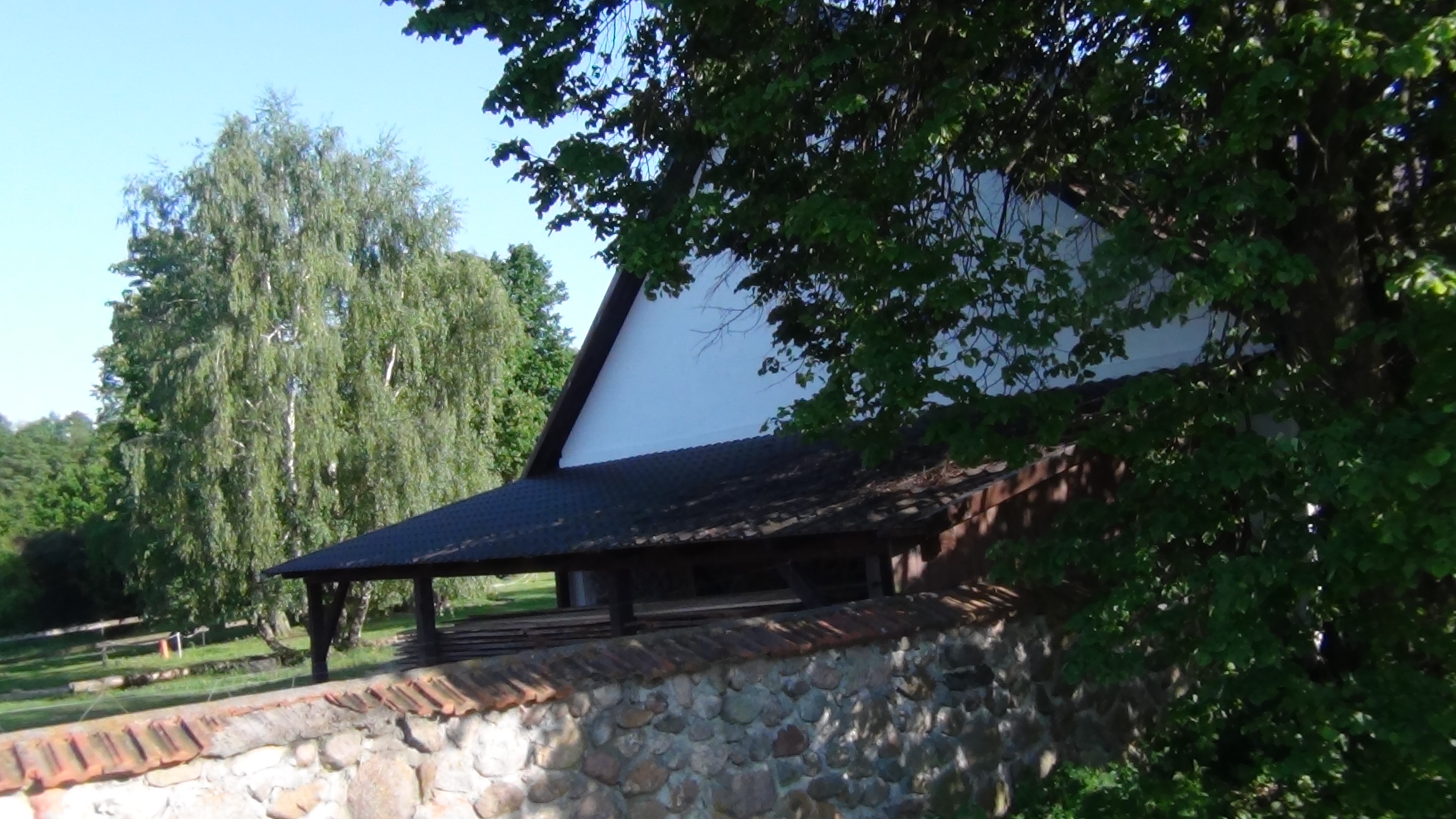 Przęczki - zabudowania